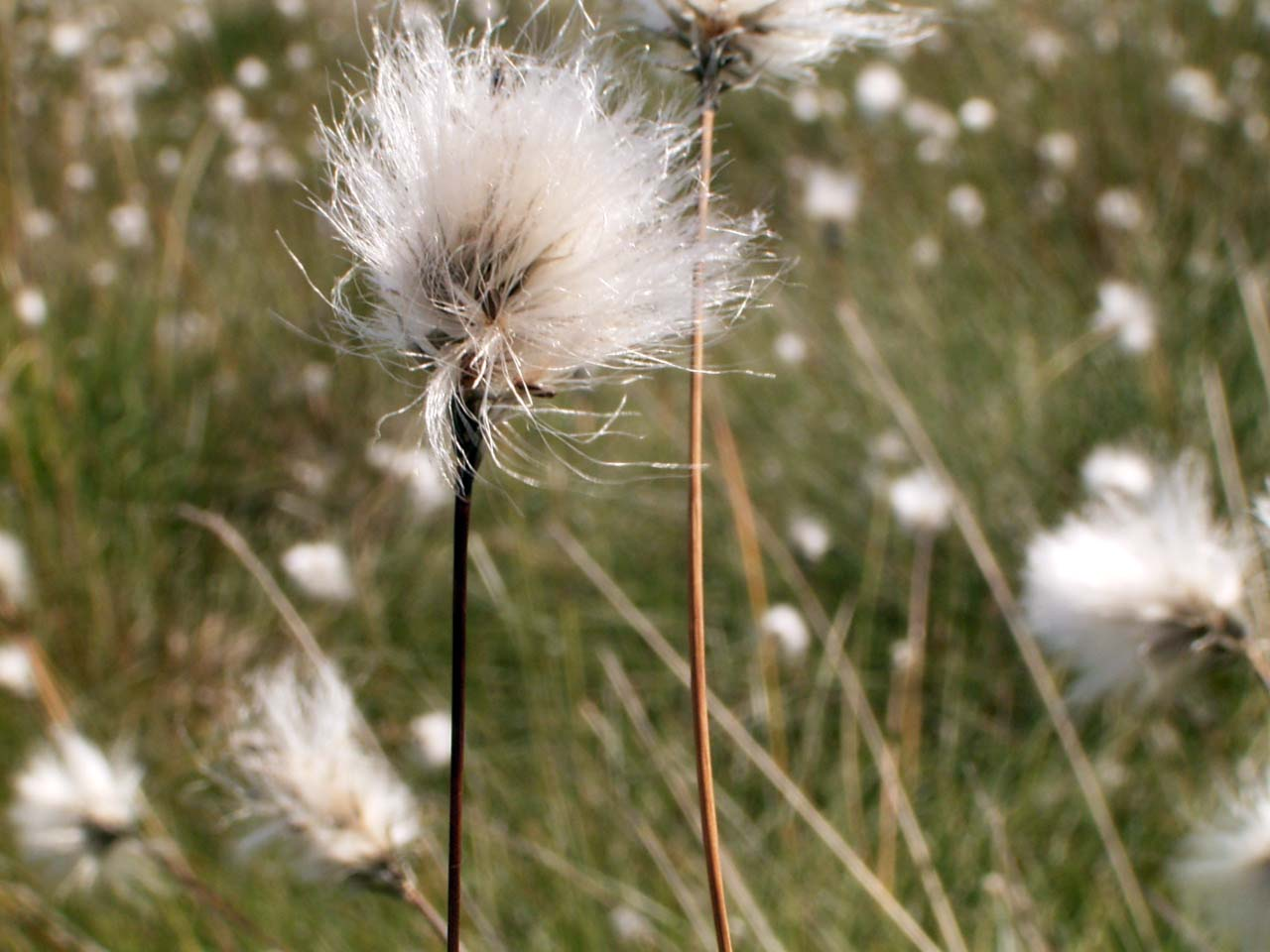 Fruchtstand des Scheiden-Wollgrases (Eriophorum vaginatum), NSG Goldenstedter Moor (Niedersachsen)